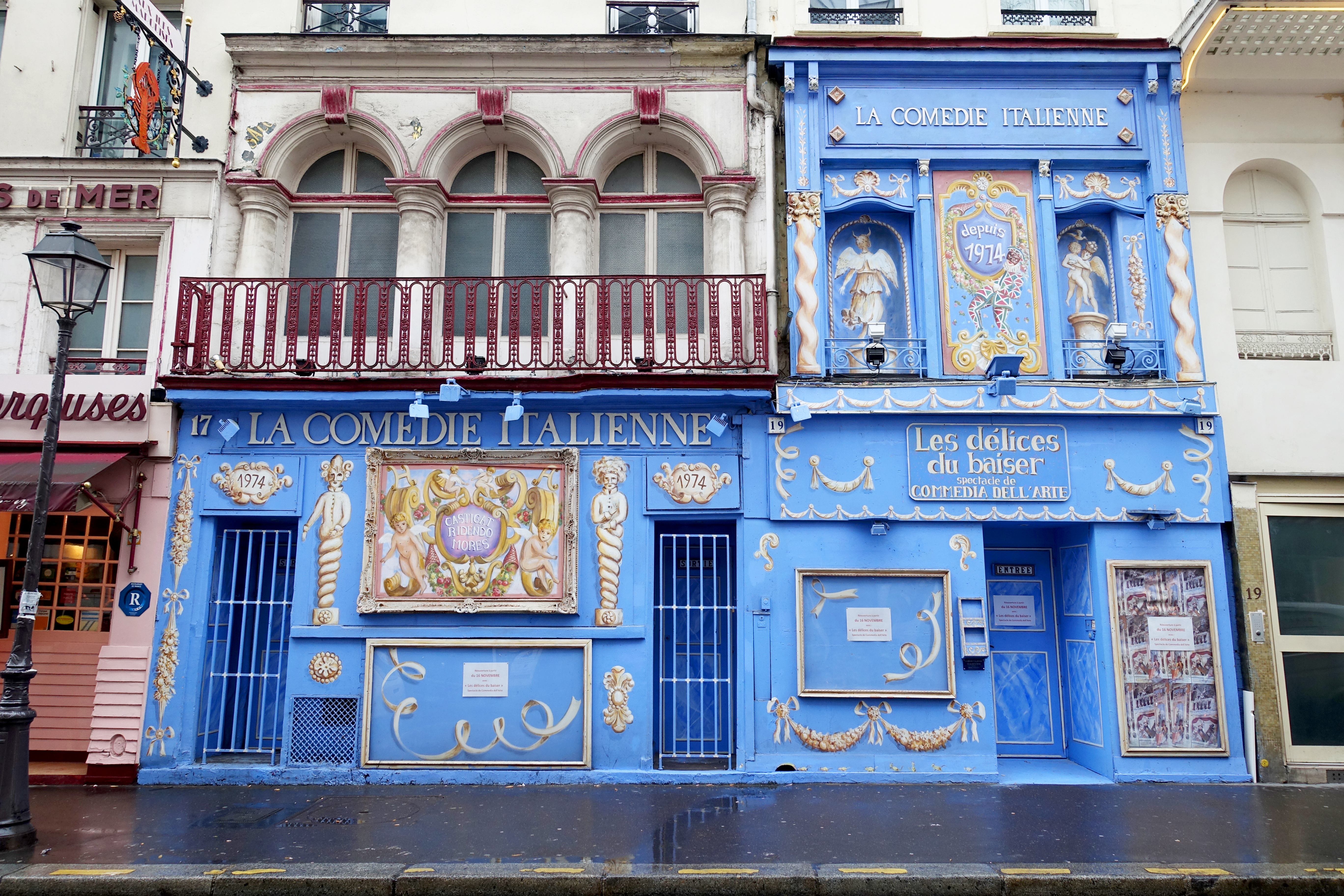 Comédie Italienne, performing arts theater, 17-19 Rue de la Gaité, 75014 Paris, France.